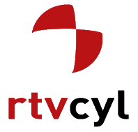 Nuevo logotipo de RTVCyL desde el 5 de Septiembre de 2011